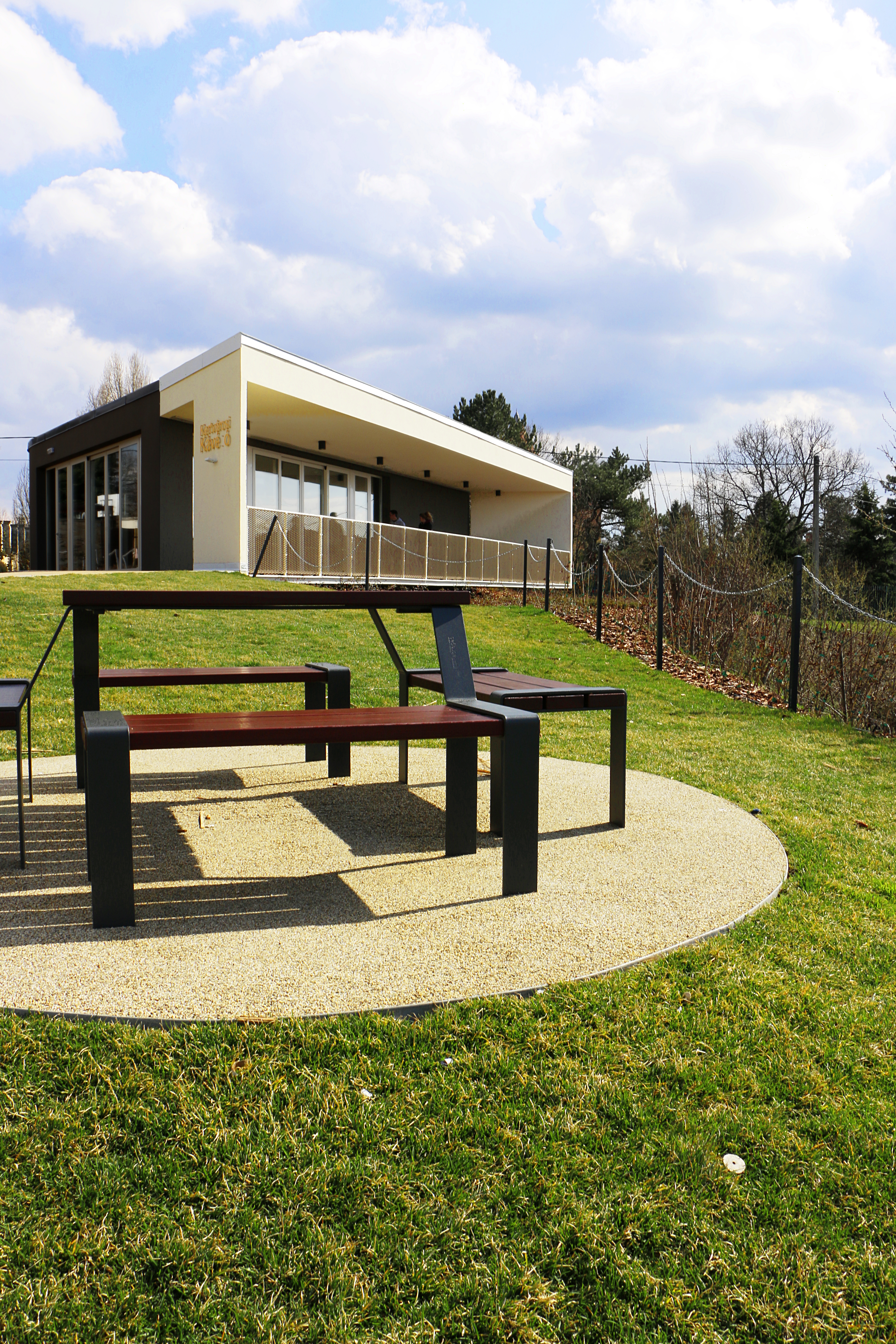 A Kertvárosi kávézó és egy piknik asztal a rákosszentmihályi Reformátorok terén